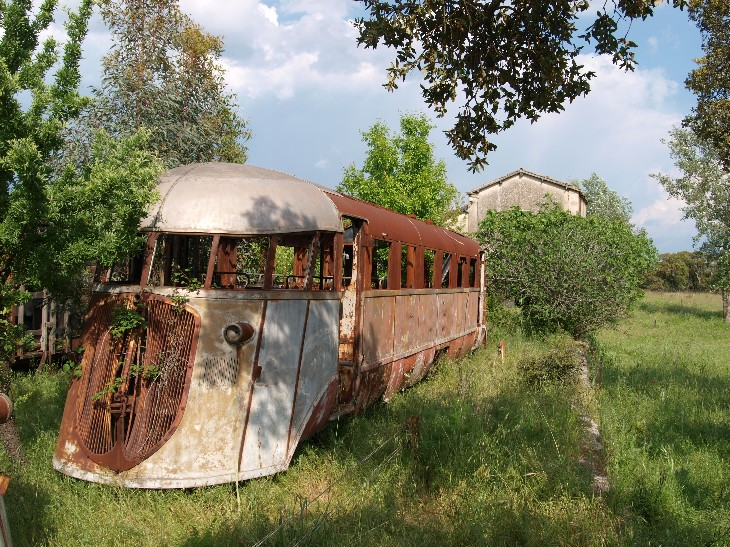 Abgestellter Triebwagen in Tirso, Sardinien